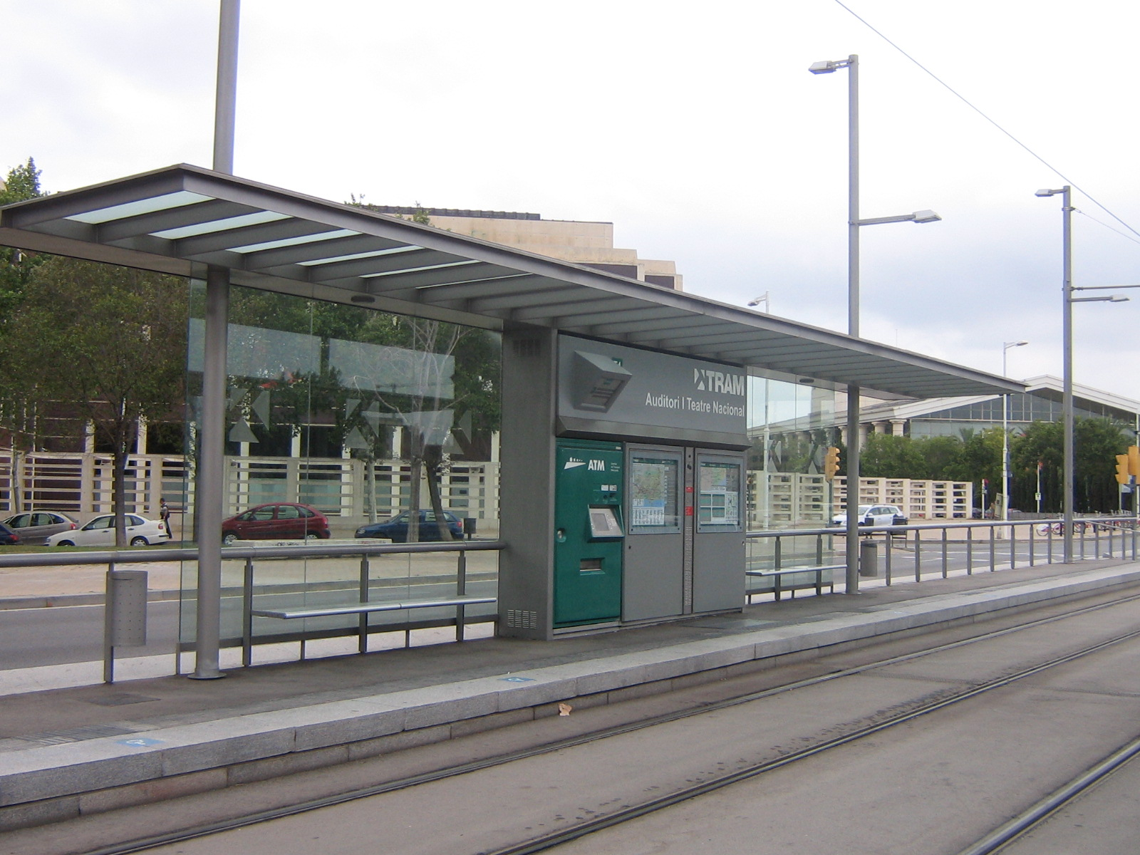 Estación de Trambesòs Auditori - Teatre Nacional (Barcelona)